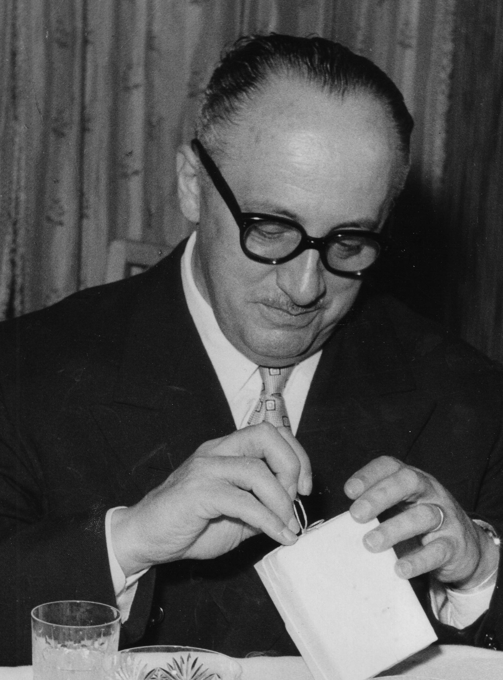 Piero Colombi durante una cerimonia